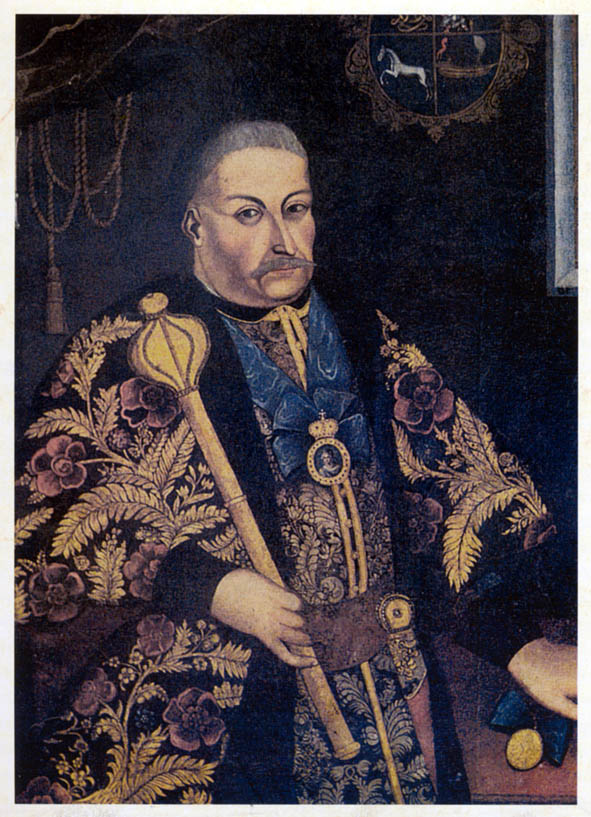 атаман Д. Е. Ефремов